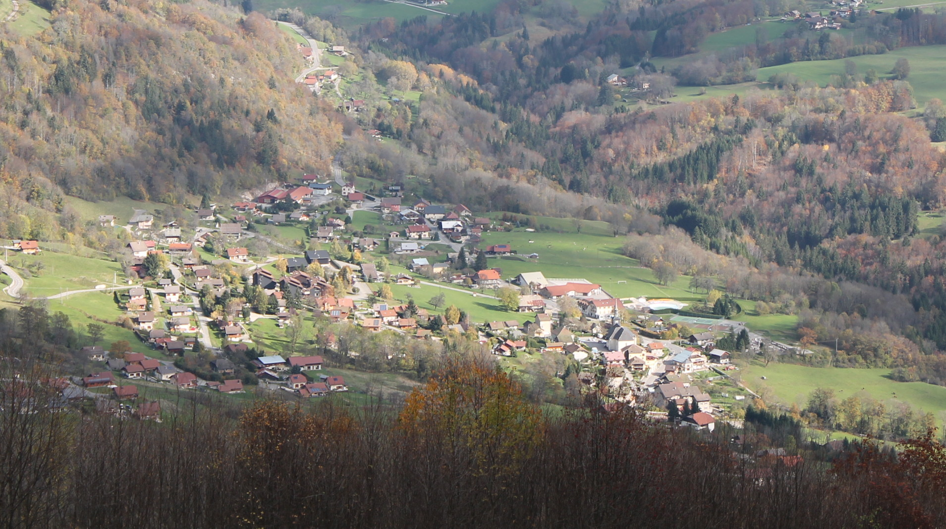 Vue générale